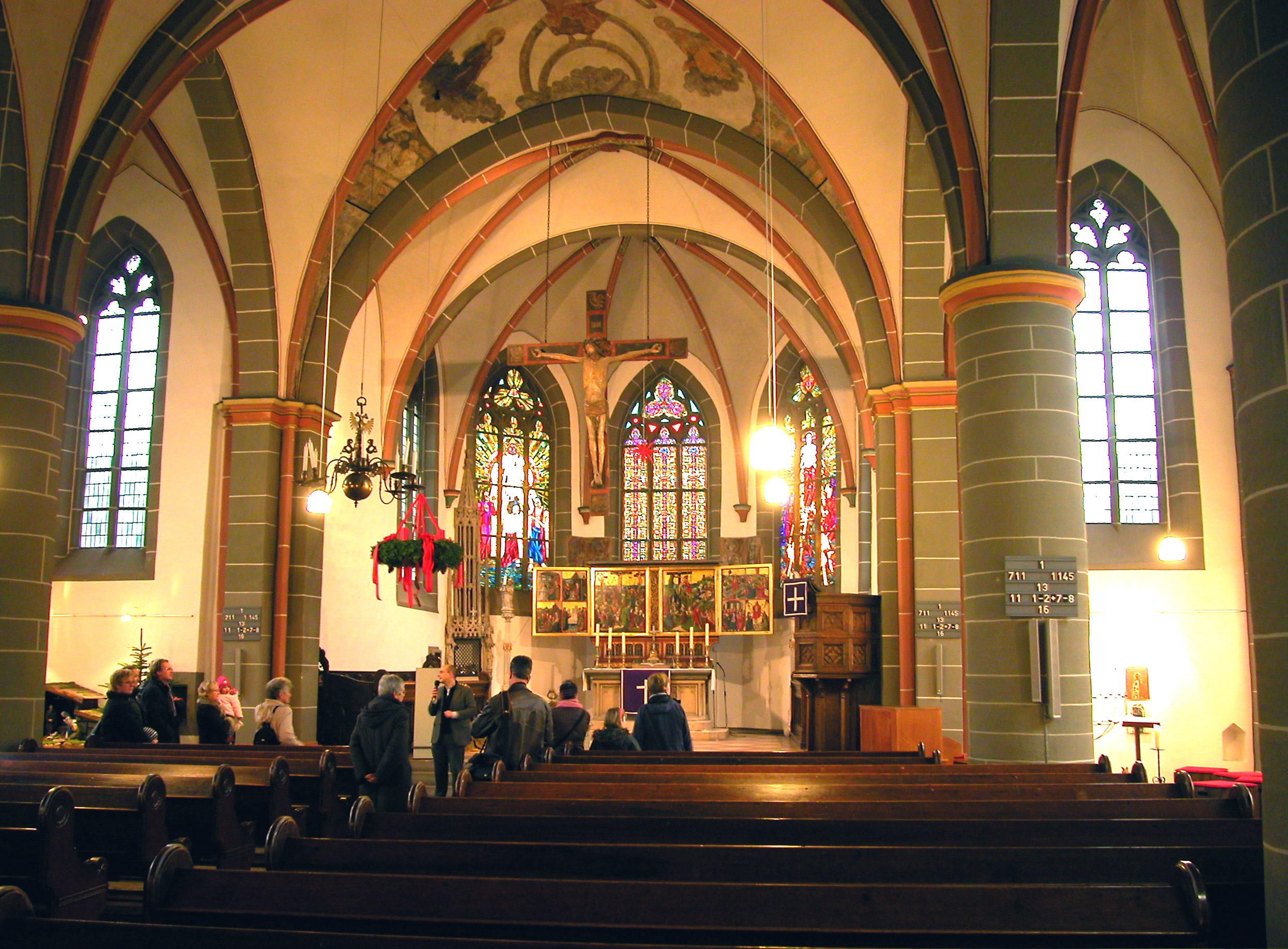 Innenraum St. Georgkirche. Luenen (de); Внутреннее убранство евангелической церкви св. Георга. Люнен (ru).